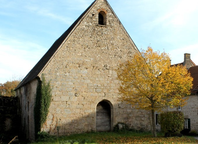 Cette petite chapelle est située dans le lieudit de "la Chapelle" dans la commune de Roches en Creuse.